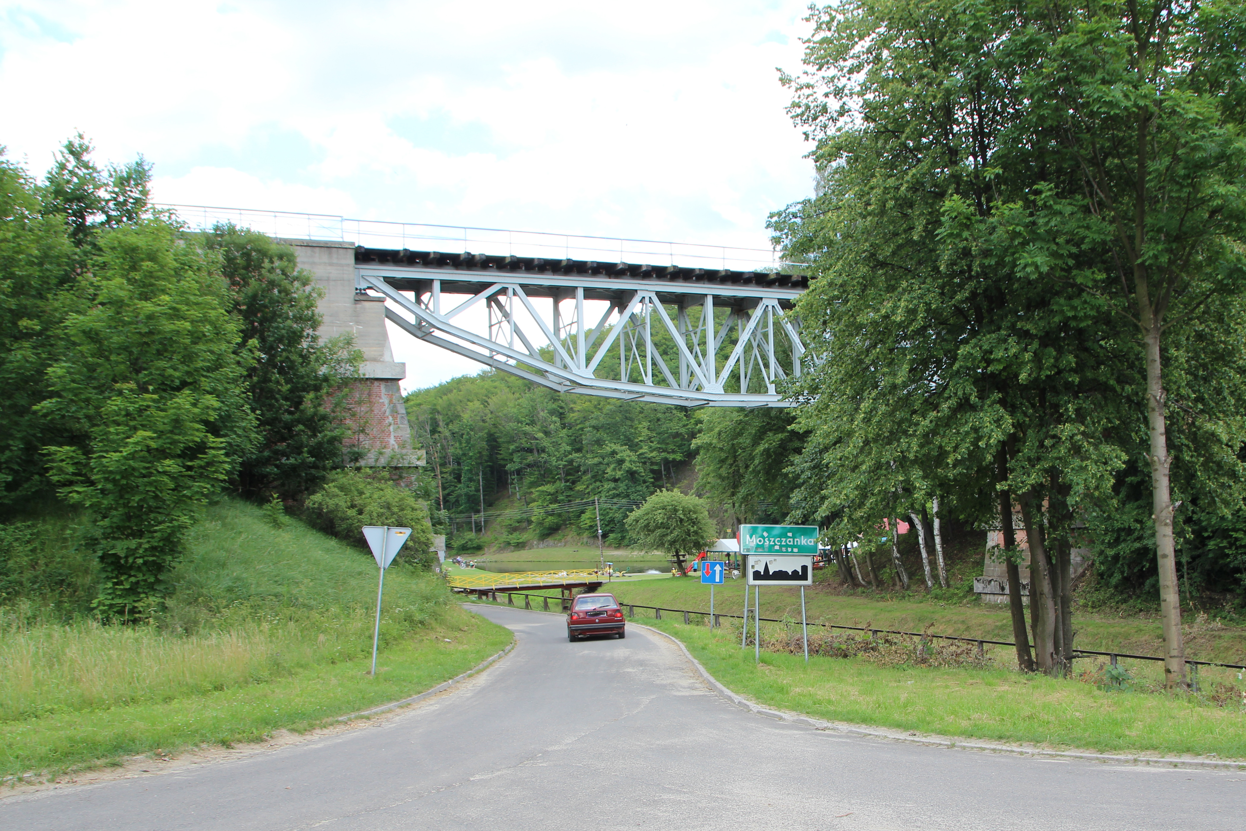 Moszczanka - wieś w Polsce w województwie opolskim, w powiecie prudnickim w gminie Prudnik.